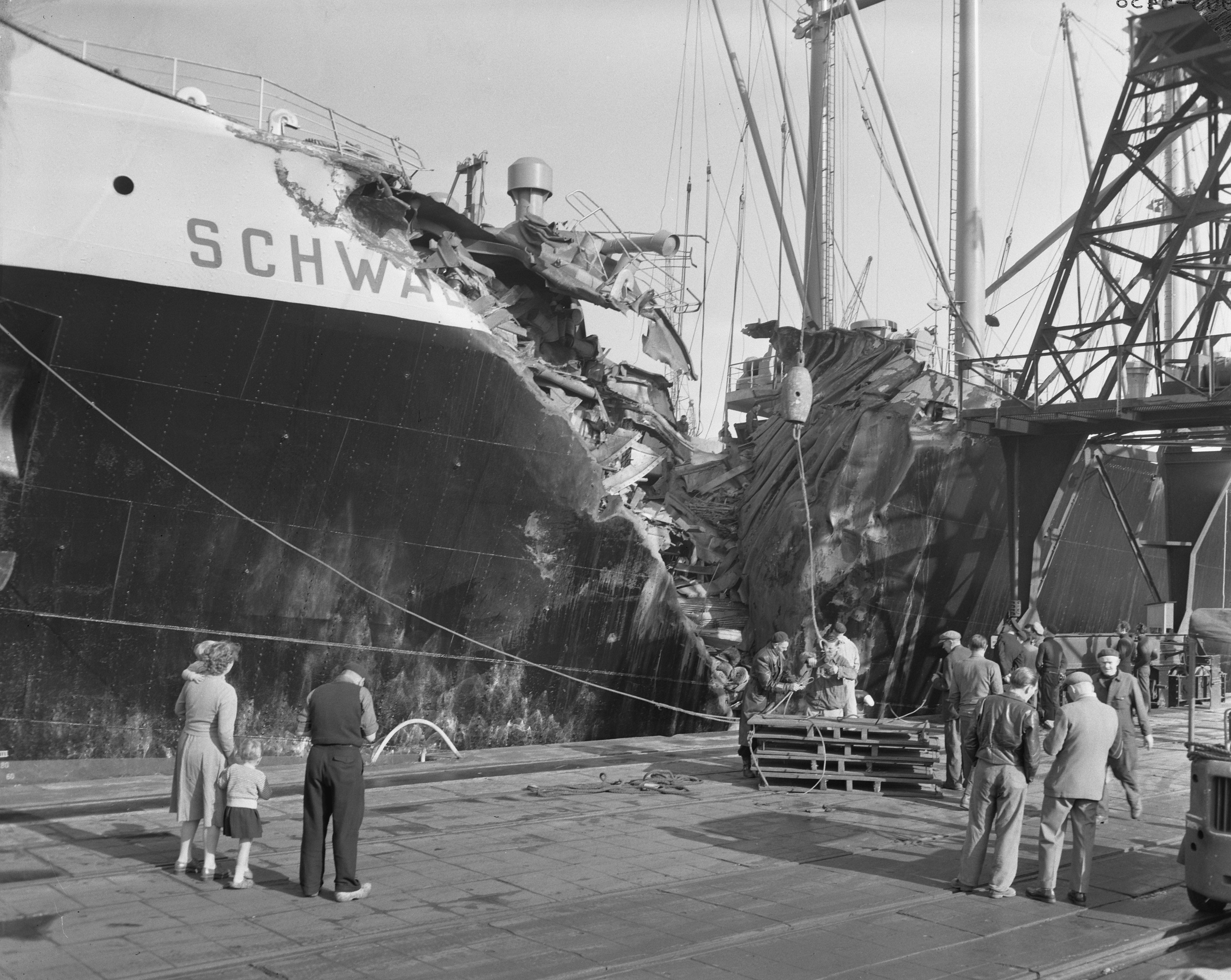 Collectie / Archief : Fotocollectie Anefo Reportage / Serie : [ onbekend ] Beschrijving : Duits vrachtschip Schwatensteijn met groot gat in Rotterdamse haven na aanvaring bij Hoek van Holland / aangetast Datum : 17 april 1957 Locatie : Rotterdam, Zuid-Holland Trefwoorden : aanvaringen, havens Fotograaf : Behrens, Herbert / Anefo Auteursrechthebbende : Nationaal Archief Materiaalsoort : Negatief (zwart/wit) Nummer archiefinventaris : bekijk toegang 2.24.01.04 Bestanddeelnummer : 908-5438